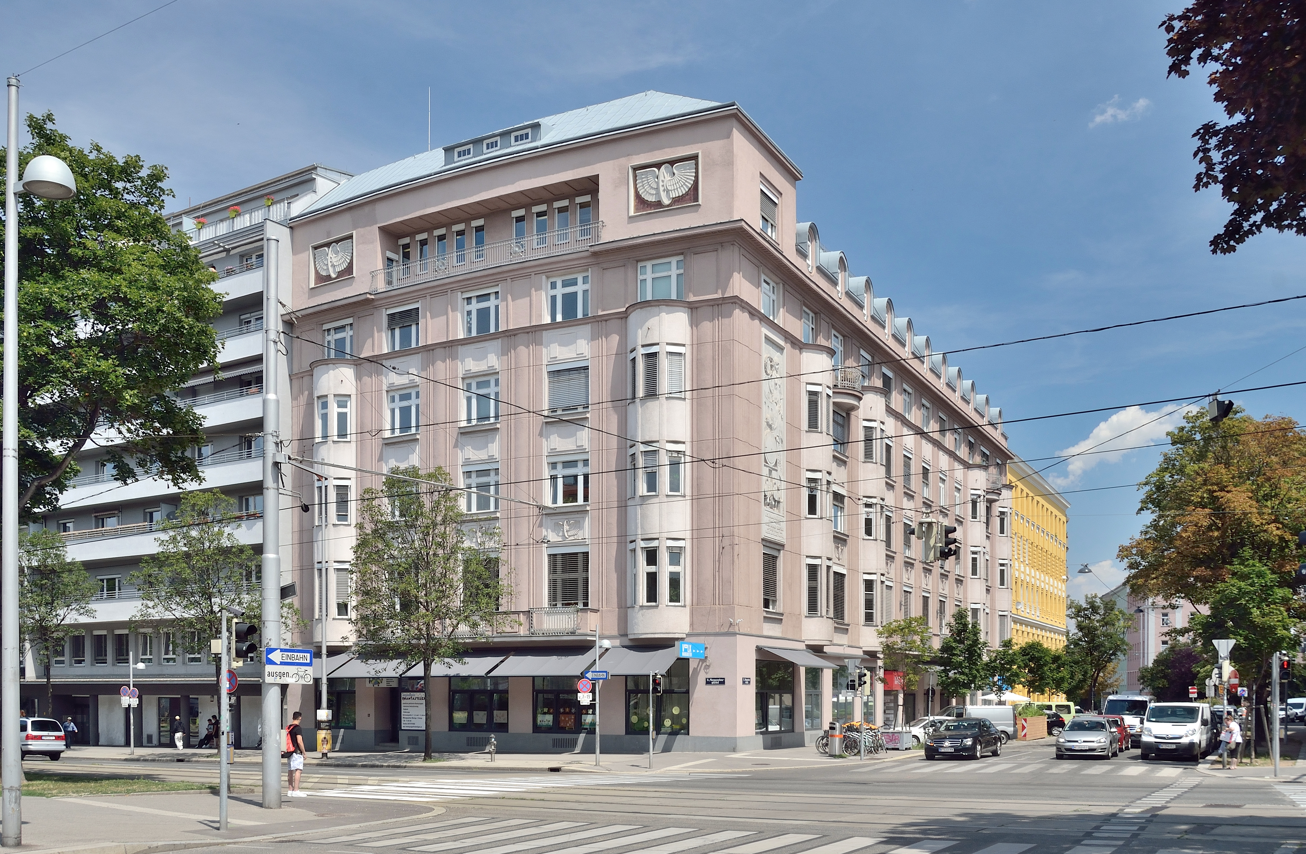 Eisenbahnerheim Wien am Margaretengürtel 136 in Wien-Margareten. Erbaut 1912/13 nach Plänen der Gessnerbrüder.